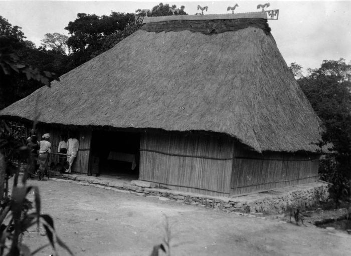 Foto. Het huis van de raja van Nikiniki